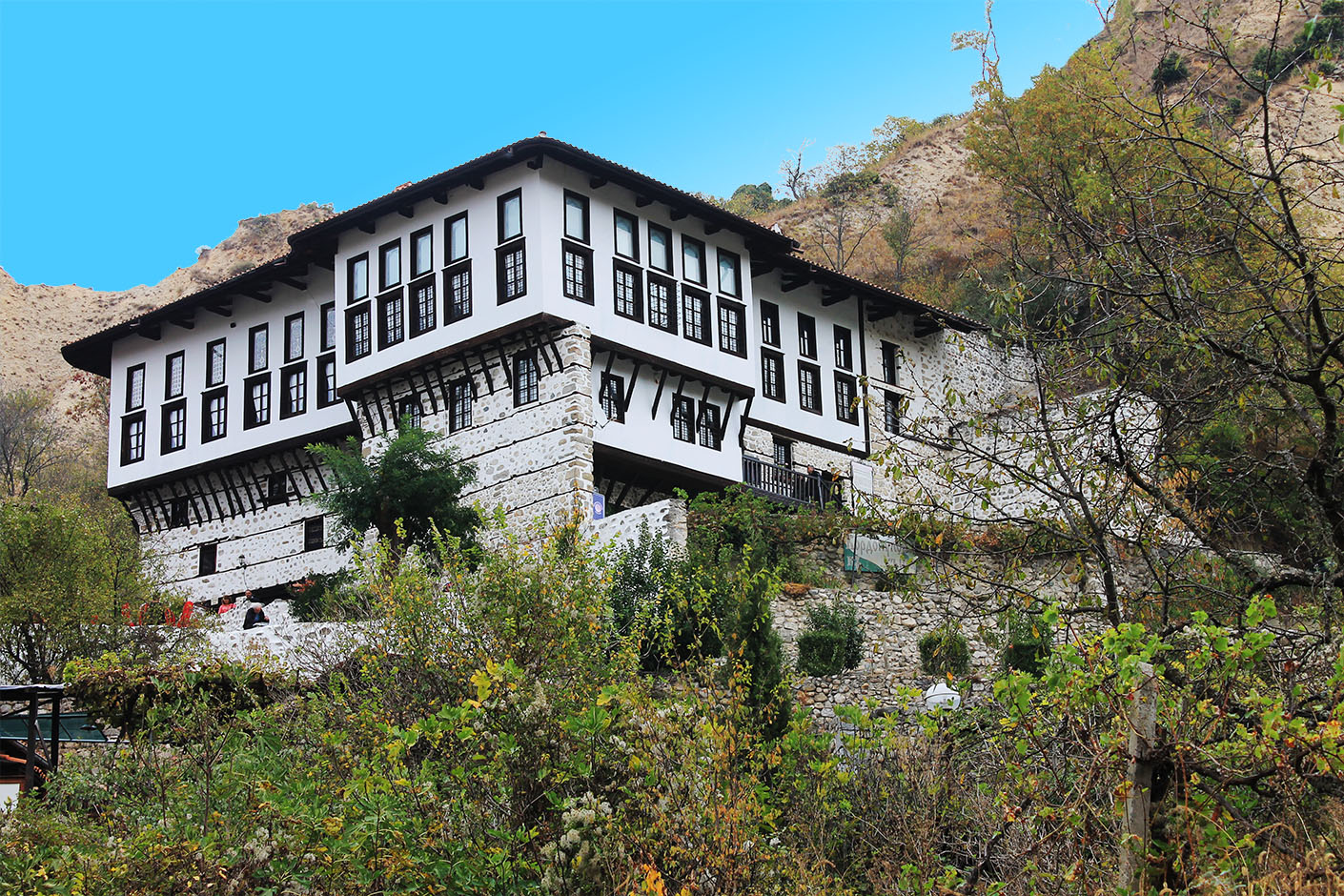 Кордопуловата къща в Мелник